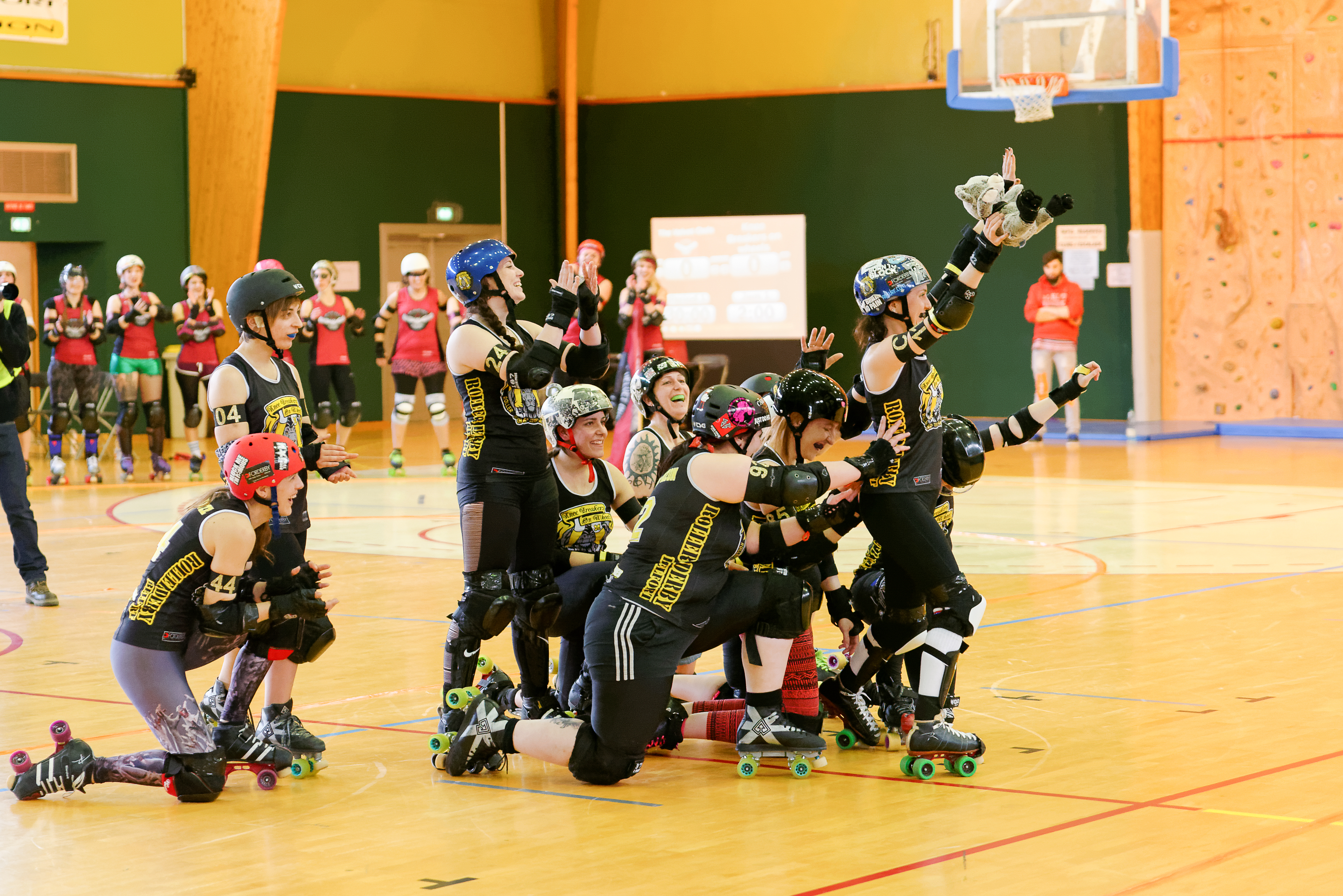 Championnat de France Roller Derby Nationale 2 Zone 5 Plateau 5. Rencontre The Velvet Owls - Roller Derby Dijon - Knee Breakers On Wheels /Roller Derby Belfort au gymnase Jean-Marc Boivin (Dijon, Côte d'Or, Bourgogne-Franche Comté, France).